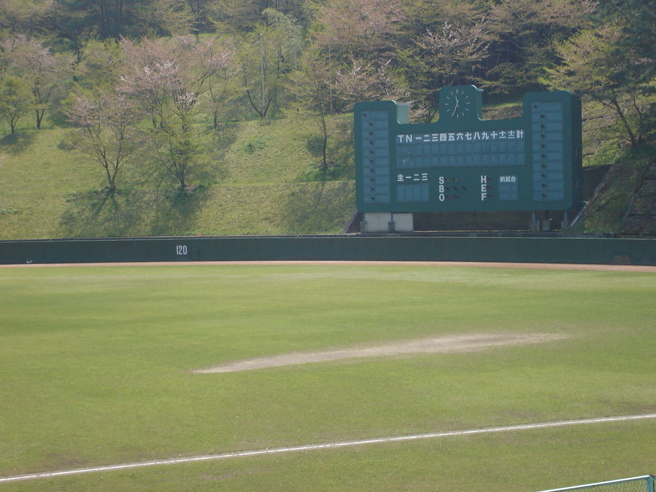 宇和島市営丸山球場。 - 日本国愛媛県宇和島市にある野球場。